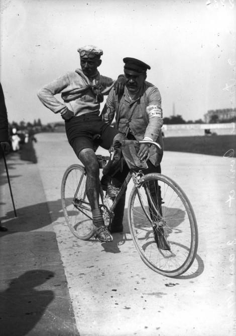 Henri Cornet lors du Tour de France 1908